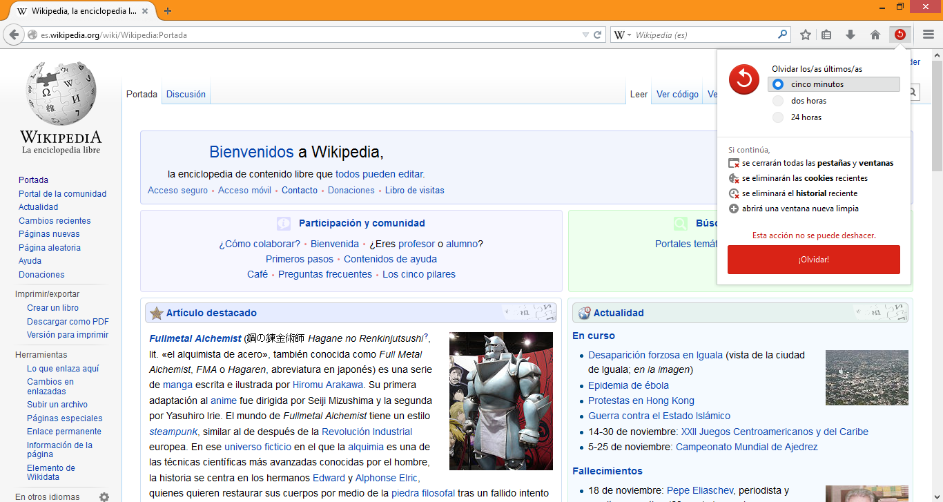 Firefox 33.1 mostrando el botón Forget